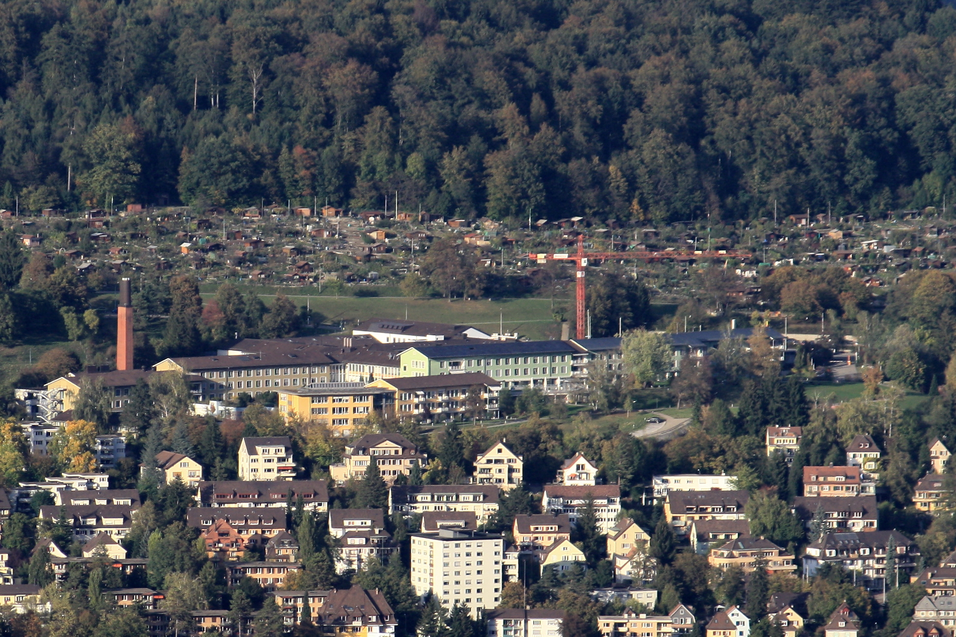 Stadtspital Waid on Käferberg-Waidberg hill and Zürich-Höngg, as seen from Uetliberg Aussichtsturm.